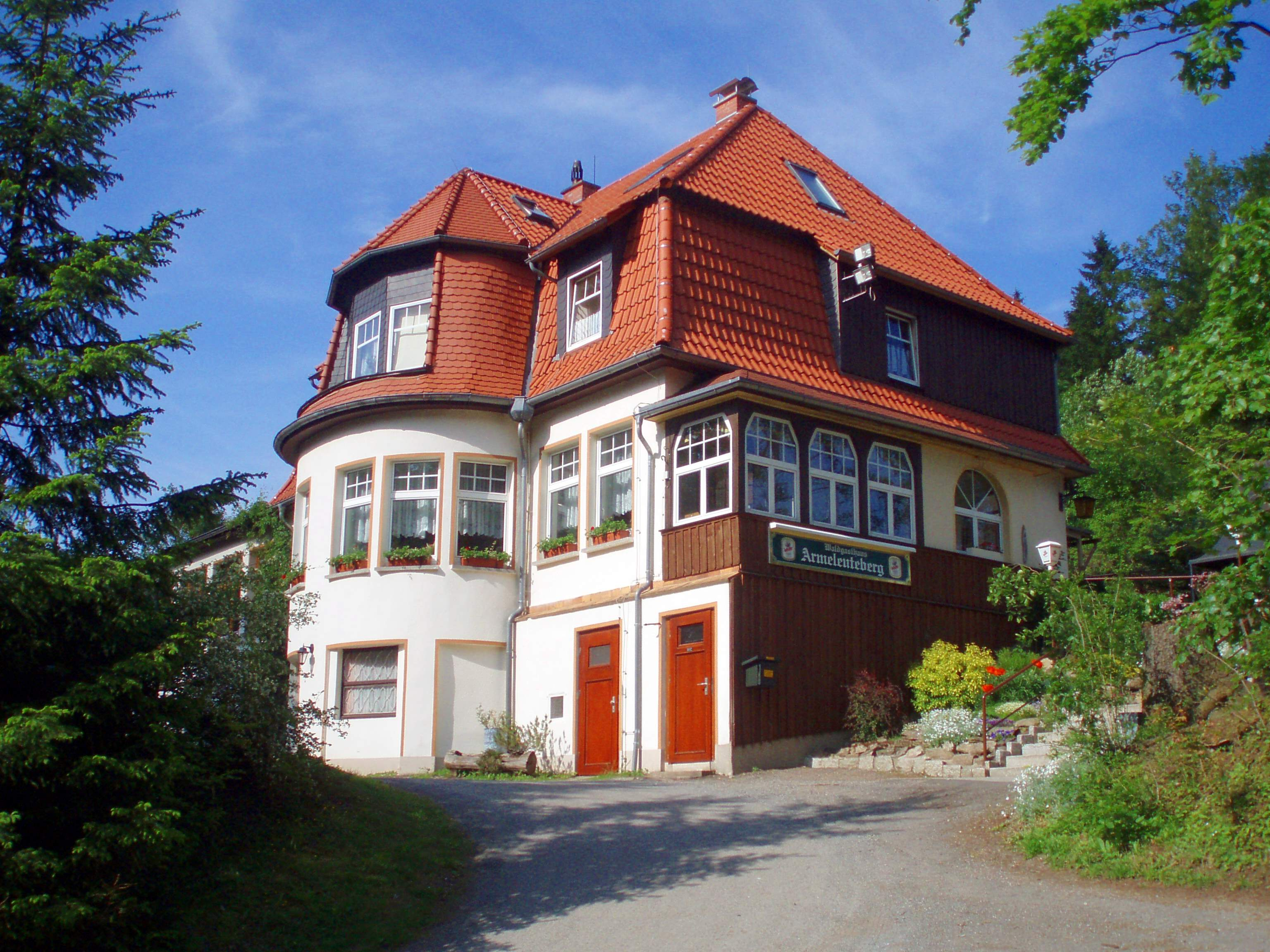 Gasthaus Armeleuteberg bei Wernigerode